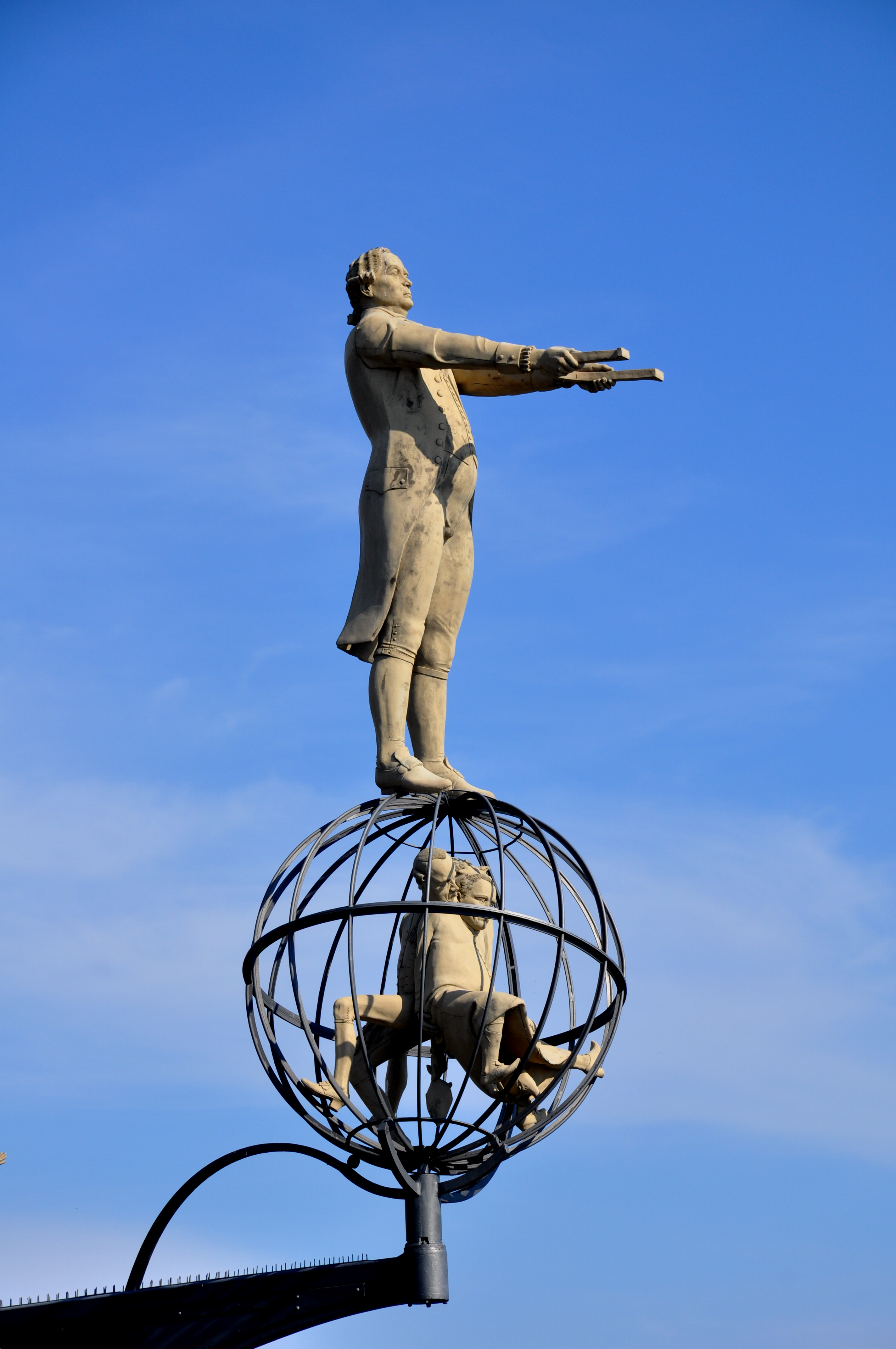 Meersburg, "Magische Säule" von Peter Lenk, Detail: Im Käfig die Wissenschaftler Maximilian Hell, Anton von Störck und Jan Ingenhousz; auf dem Dach des Käfigs Franz Anton Mesmer triumphierend mit einem riesigen hufeisenförmigen Magneten in den Händen